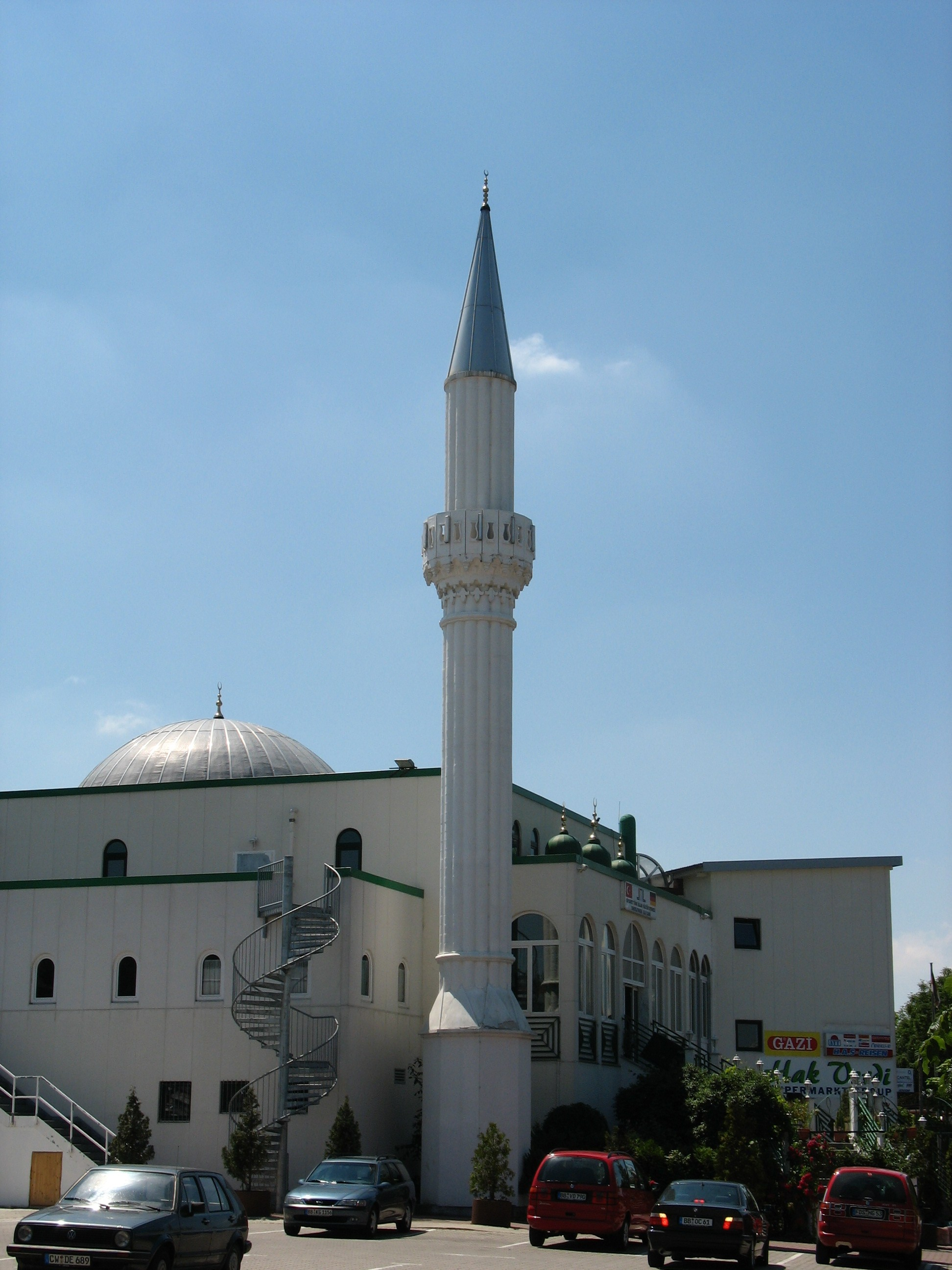 Die im Jahr 2000 eingeweihte Ulu-Moschee in Sindelfingen Sonstiges: Bild:SindelfingenmitMoschee.jpg ähnliches Motiv